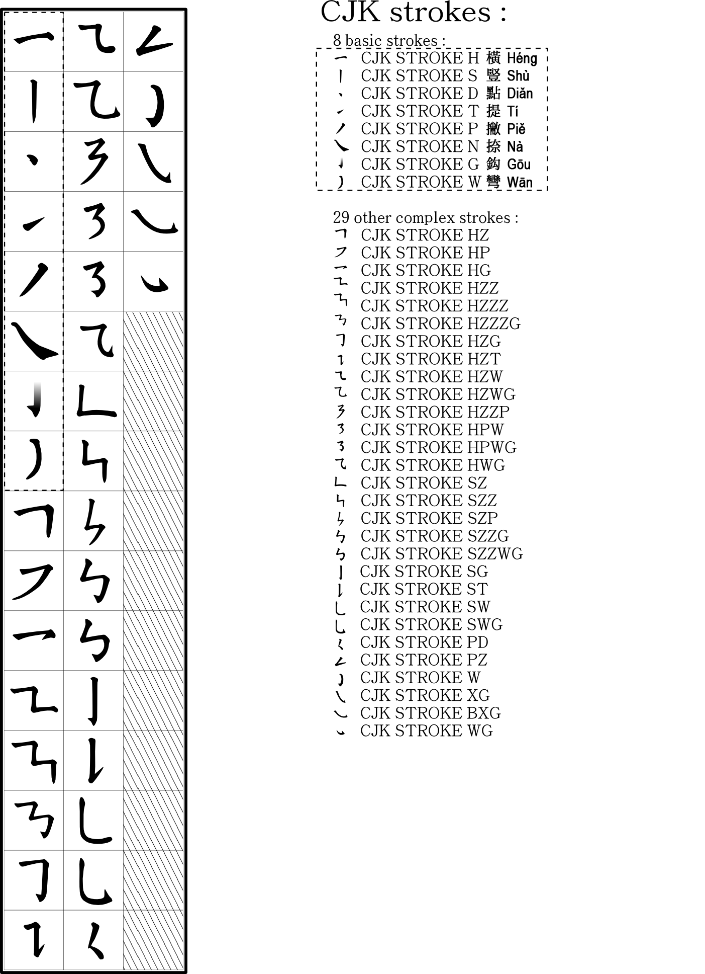 CJK_37_Strokes_(8+29).png Stroke order Stroke order